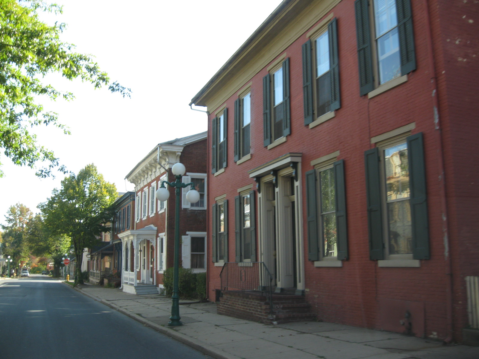 Lewisburg, Pennsylvania